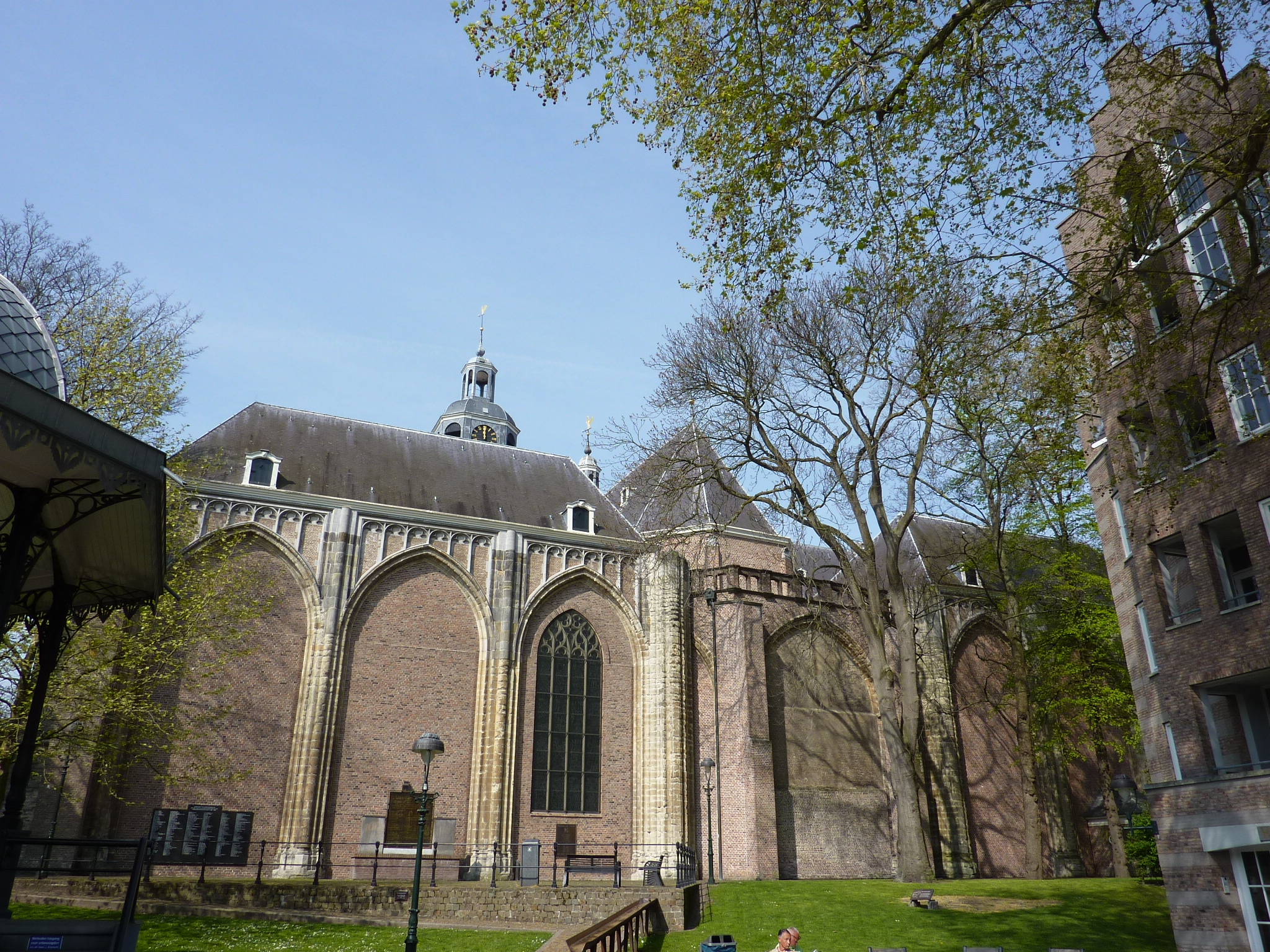 Sint-Gertrudiskerk (Bergen op Zoom)